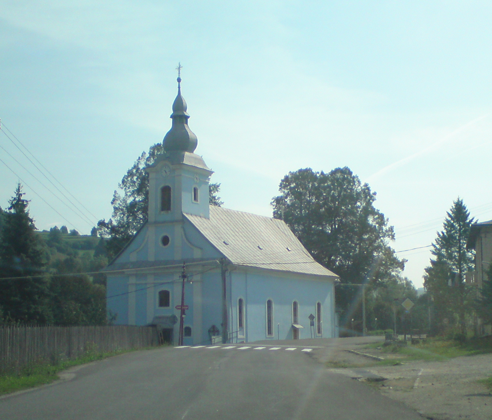 Kostol v obci